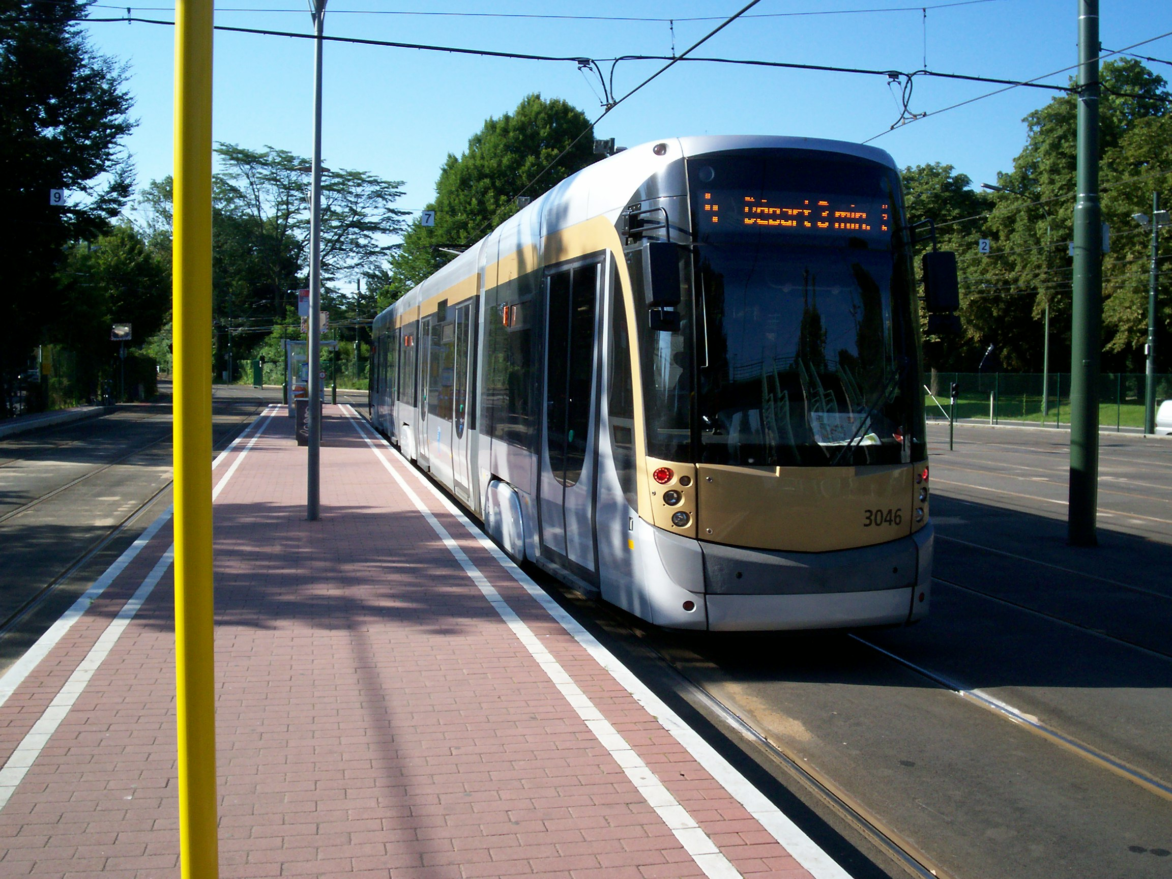 T 3000 de la ligne 4 en attente de l'heure de départ à "Esplanade"